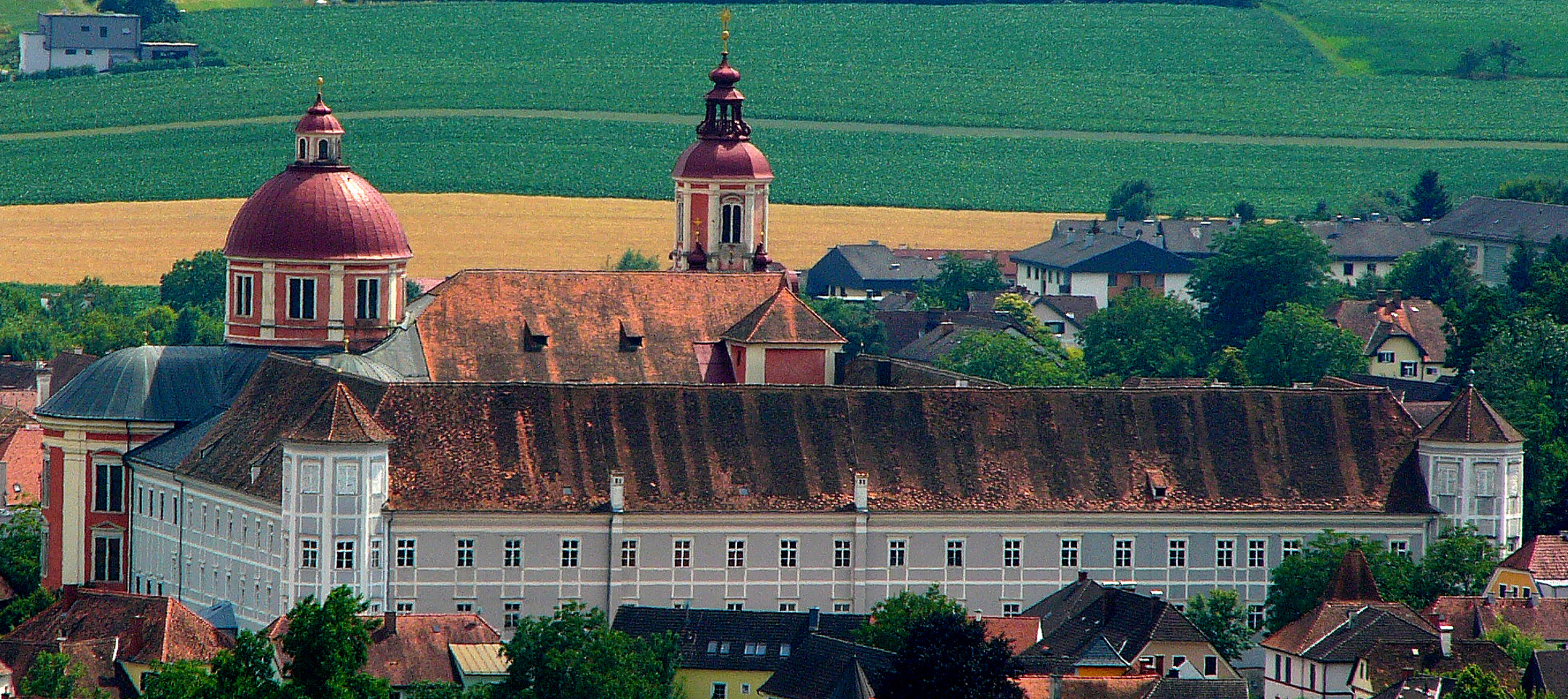 Blick auf das ehemalige Stift Pöllau.